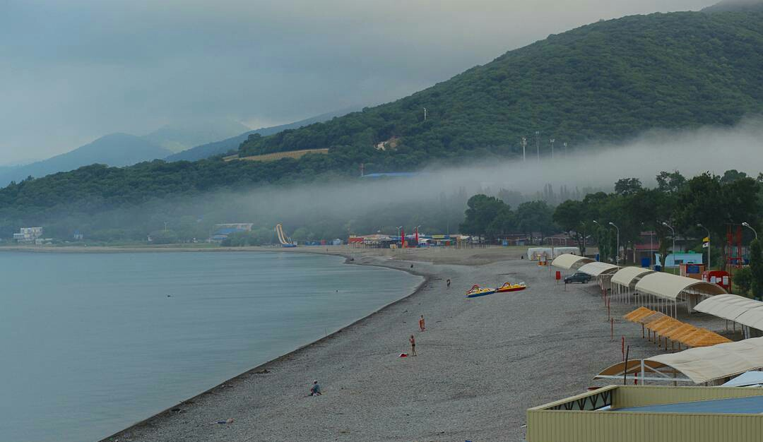 Посёлок Криница в город-курорте Геленджик